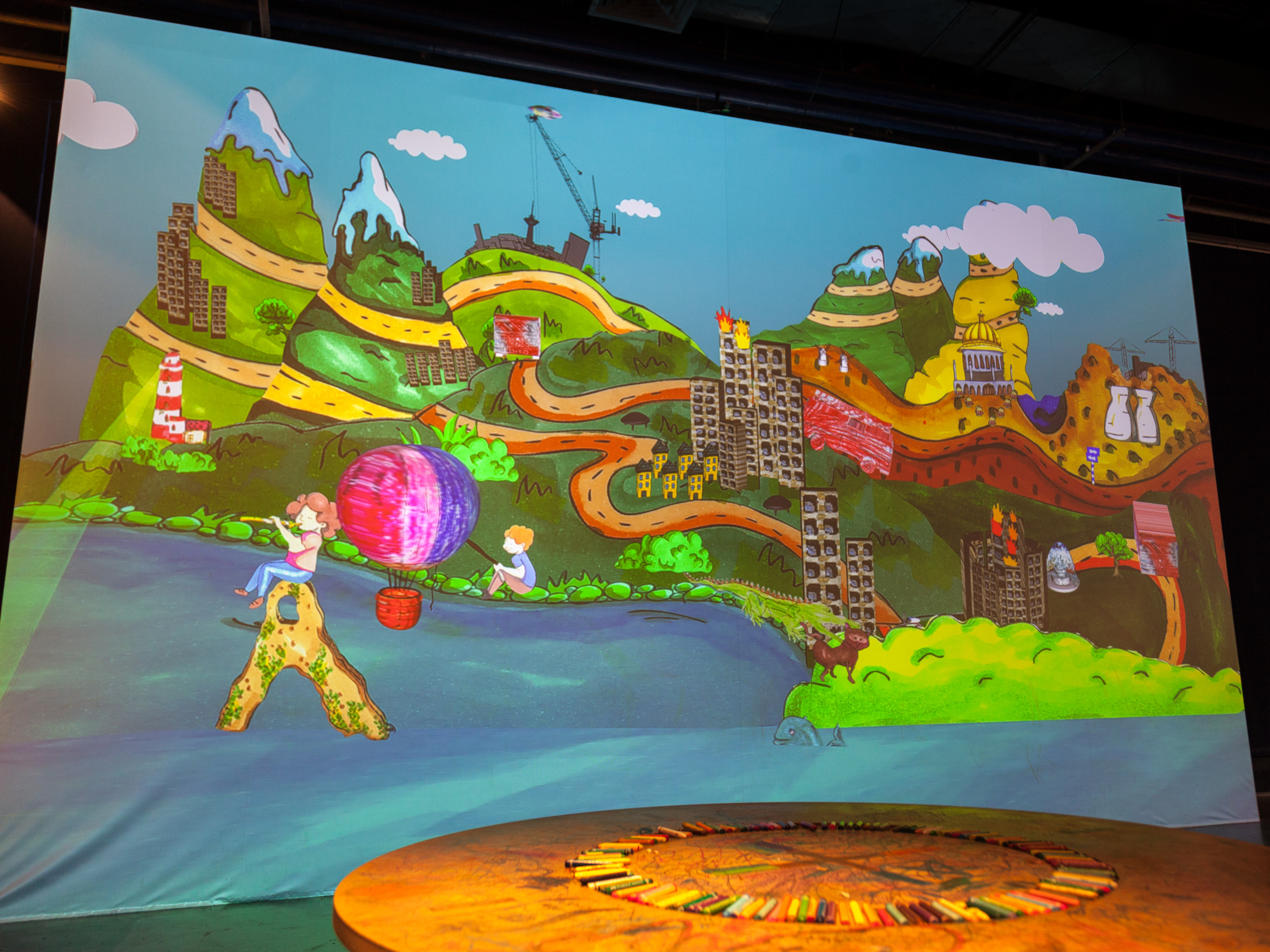 צילום של קיר היצירה האינטראקטיבי במדעטק. הצבעים שעל השולחן משמשים את המבקרים לצביעת הציורים שלאחר מכן נסרקים מופיעים על גבי המסך המצוייר.